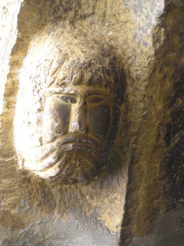 Detall de l'arquivolta de Sant Climent de Grèixer